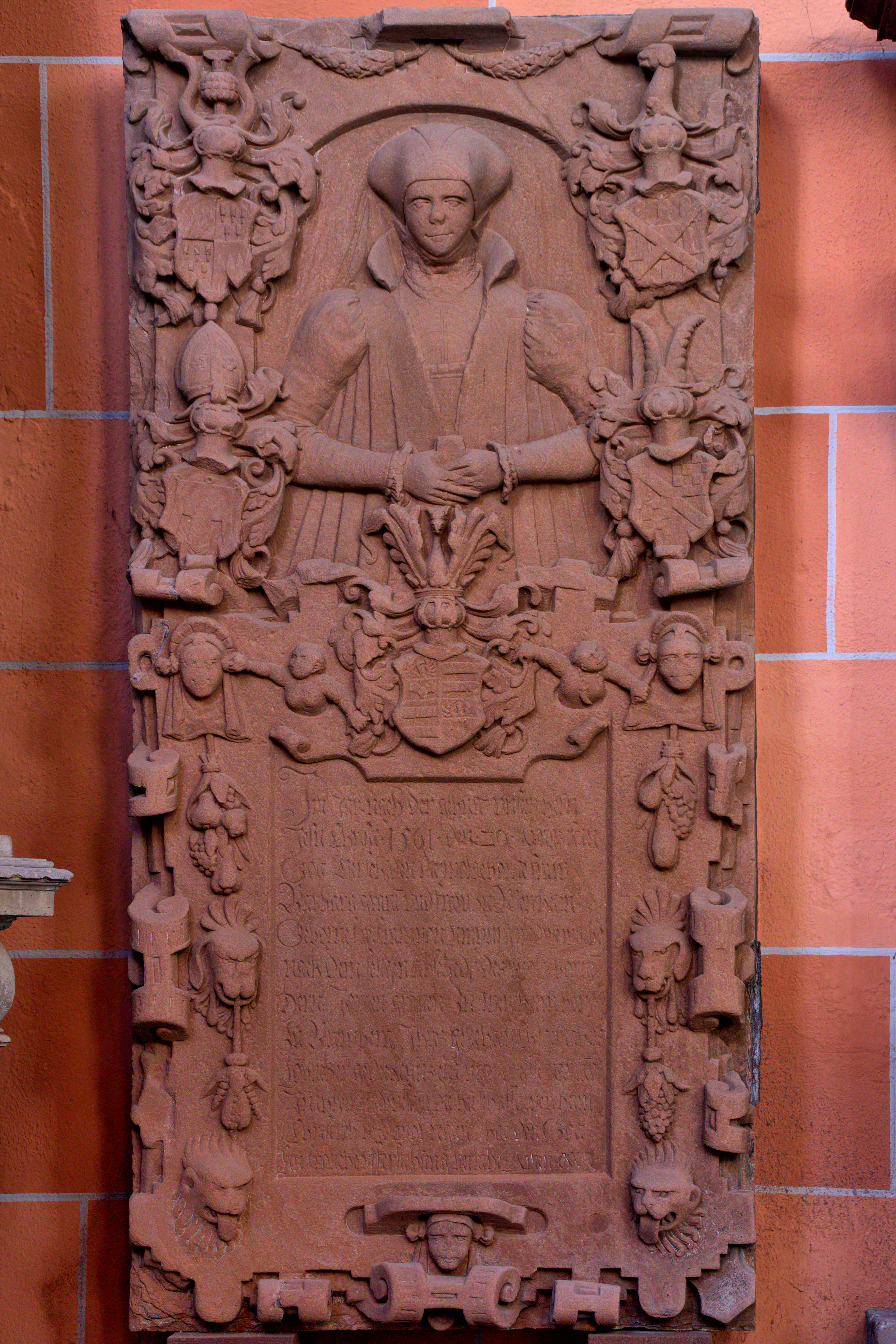 Grabplatte Barbara von Wertheim, Ev. Striftskirche zu Wertheim